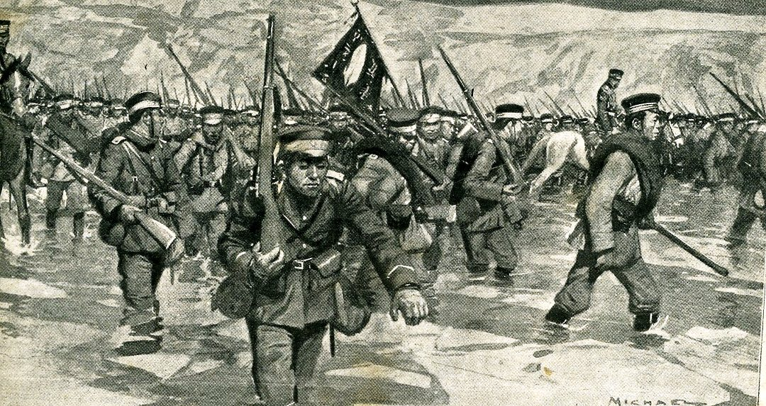 La marche en avant des Japonais dans le nord de la Corée Infanterie japonaise traversant un gué